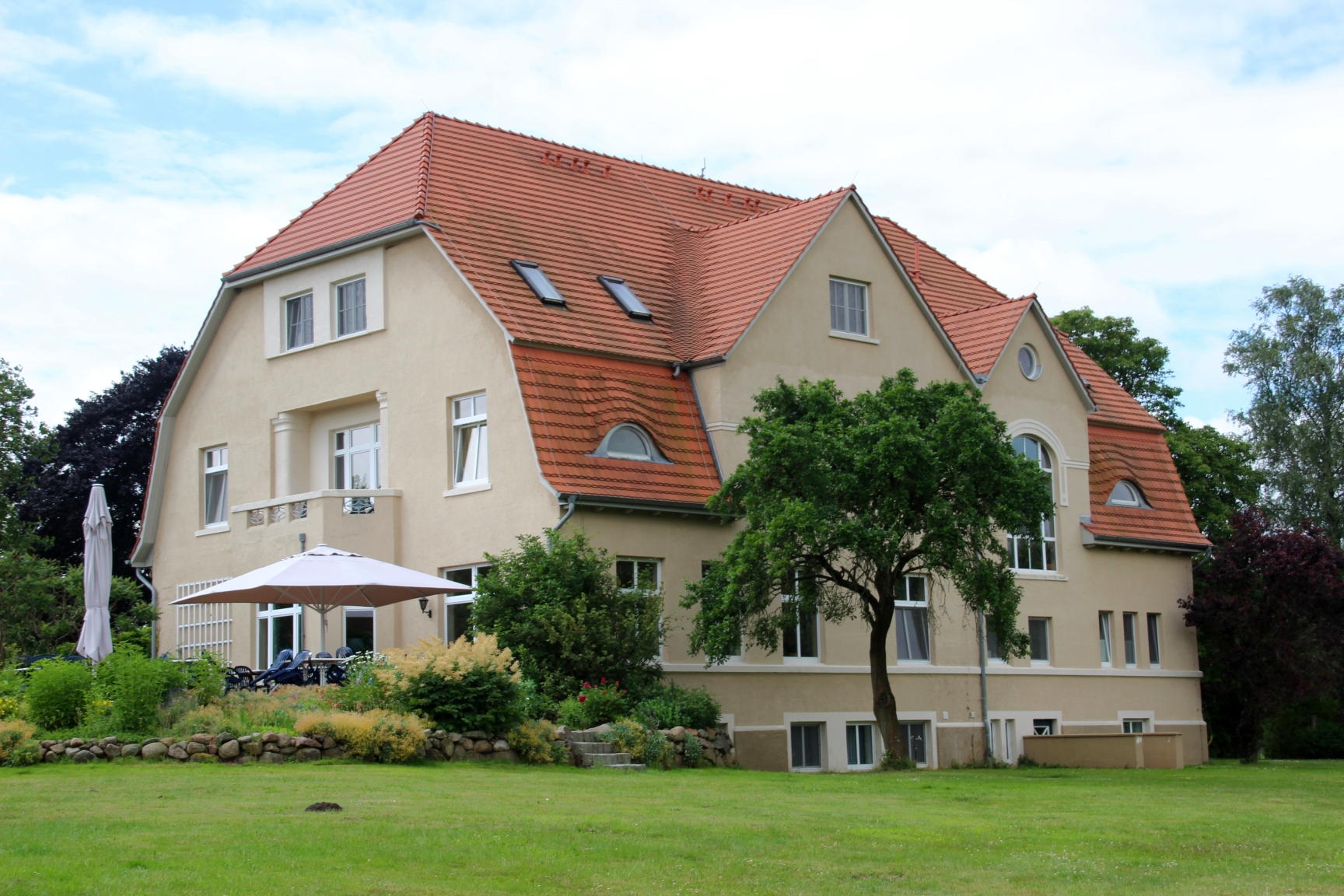 Gutshaus in Barkow bei Plau am See, Blick aus Richtung der Müritz-Elde-Wasserstraße